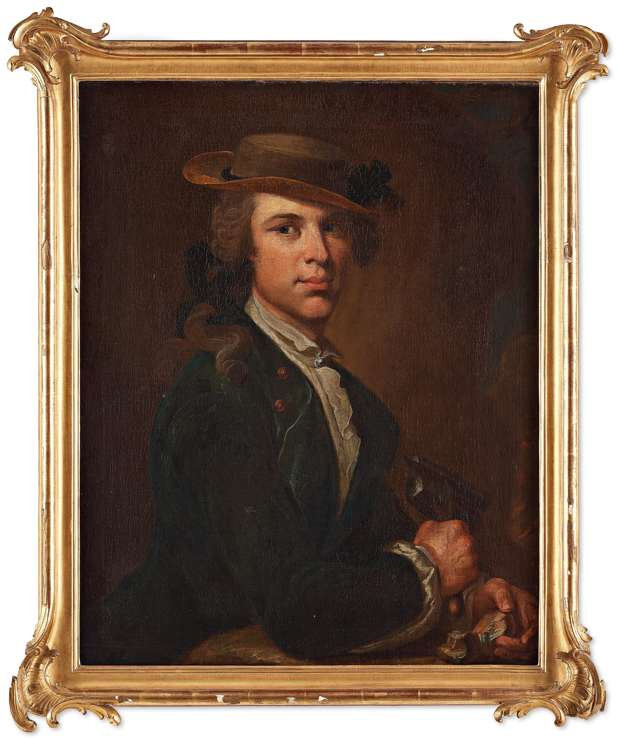 Bergsrådet Daniel Tilas (1712-1772), avporträtterad ca 1750 av Olof Arenius.